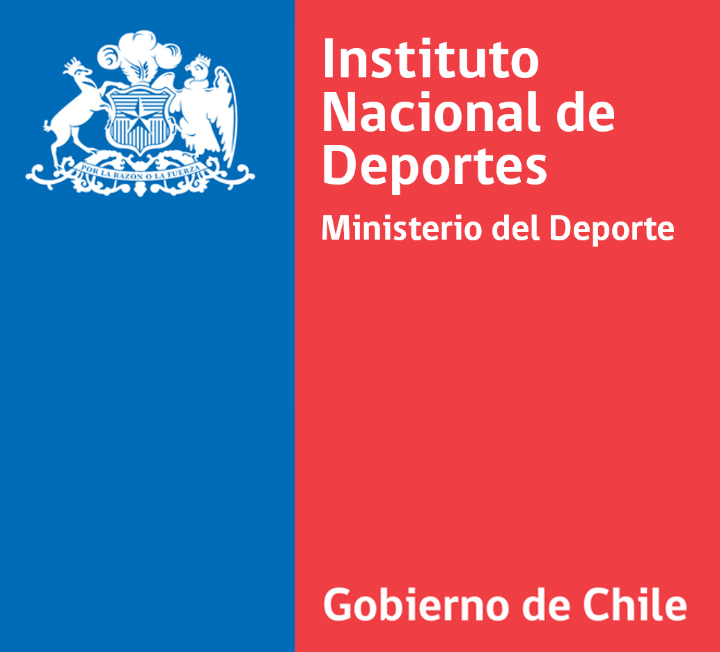 Logo Institucional Instituto Nacional de Deportes.